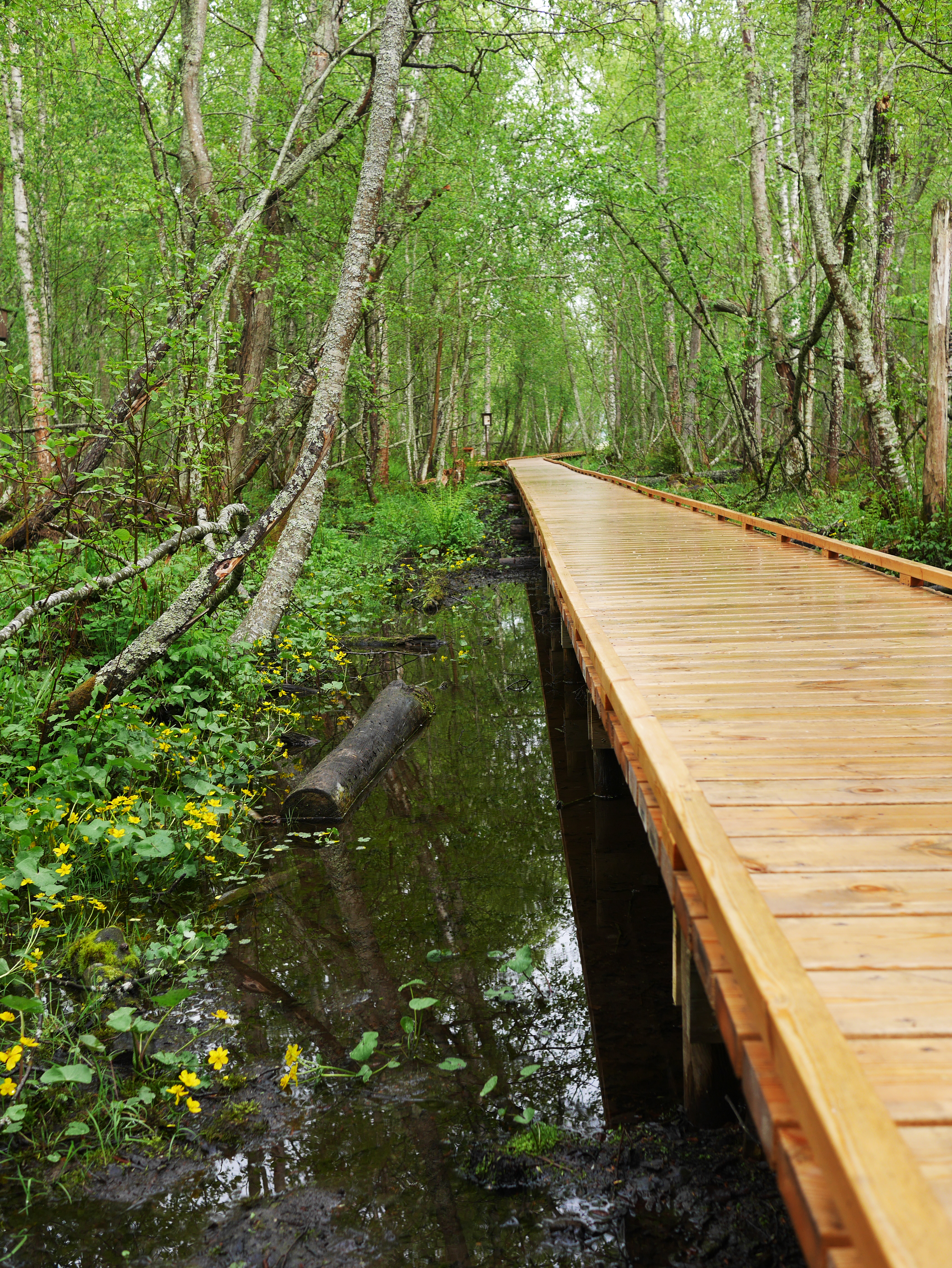 Spången ut till näset har breddats så rullstolar och barnvagnar kan ta sig ut.